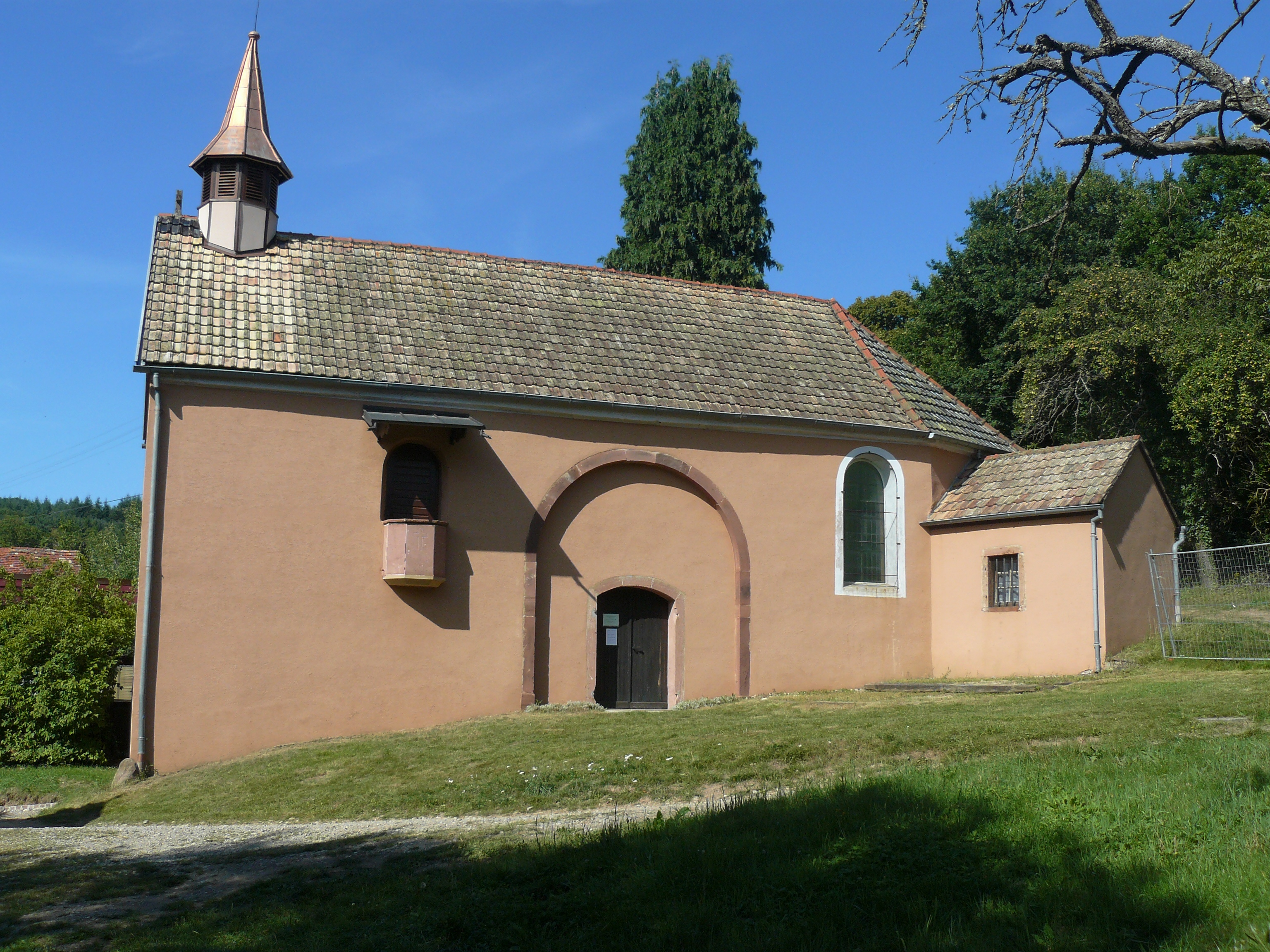 Chapelle Saint Gangolphe à Schweighouse commune de Lautenbach